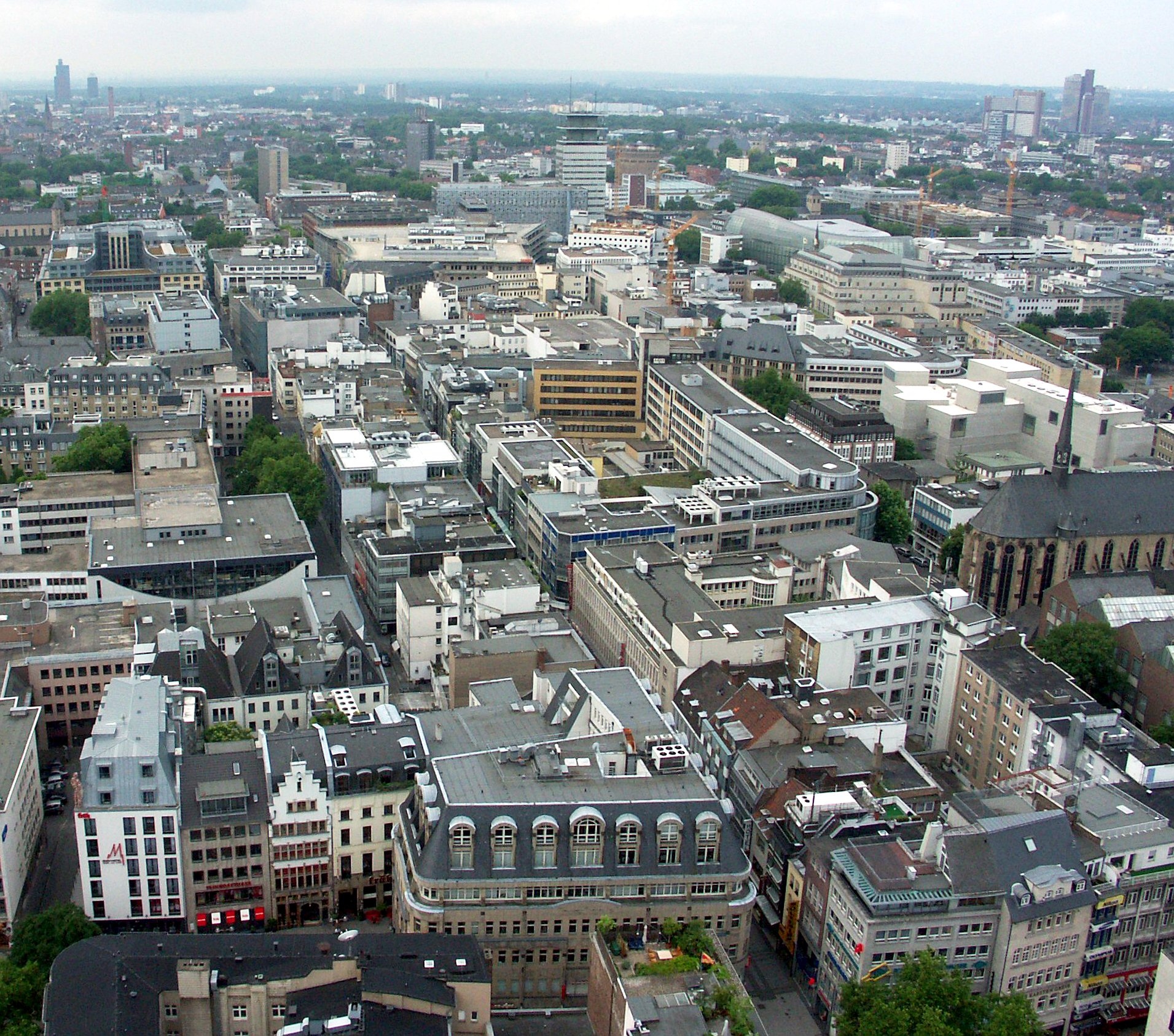 Köln-Innenstadt-Südhälfte, Blick vom Dom auf den Verlauf der "Hohe Straße"